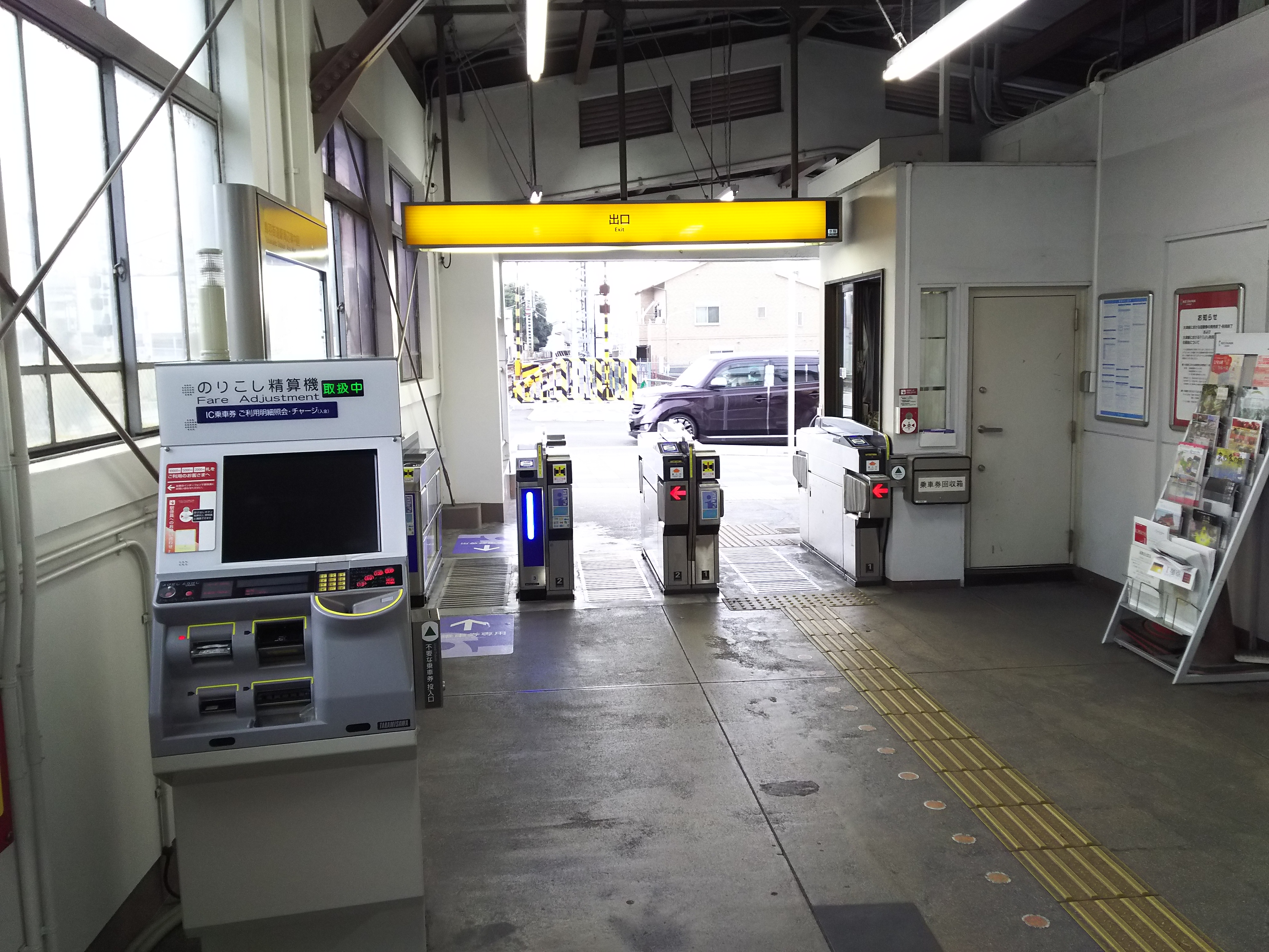 京阪本線鳥羽街道駅改札口（京都市東山区）